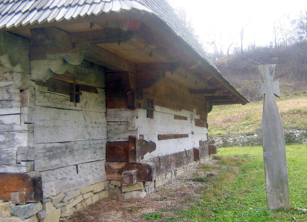 Biserica de lemn din Prodăneşti, Sălaj. Pereţii dinspre nord. Foto: Mihai Petriş, 12 decembrie 2007.